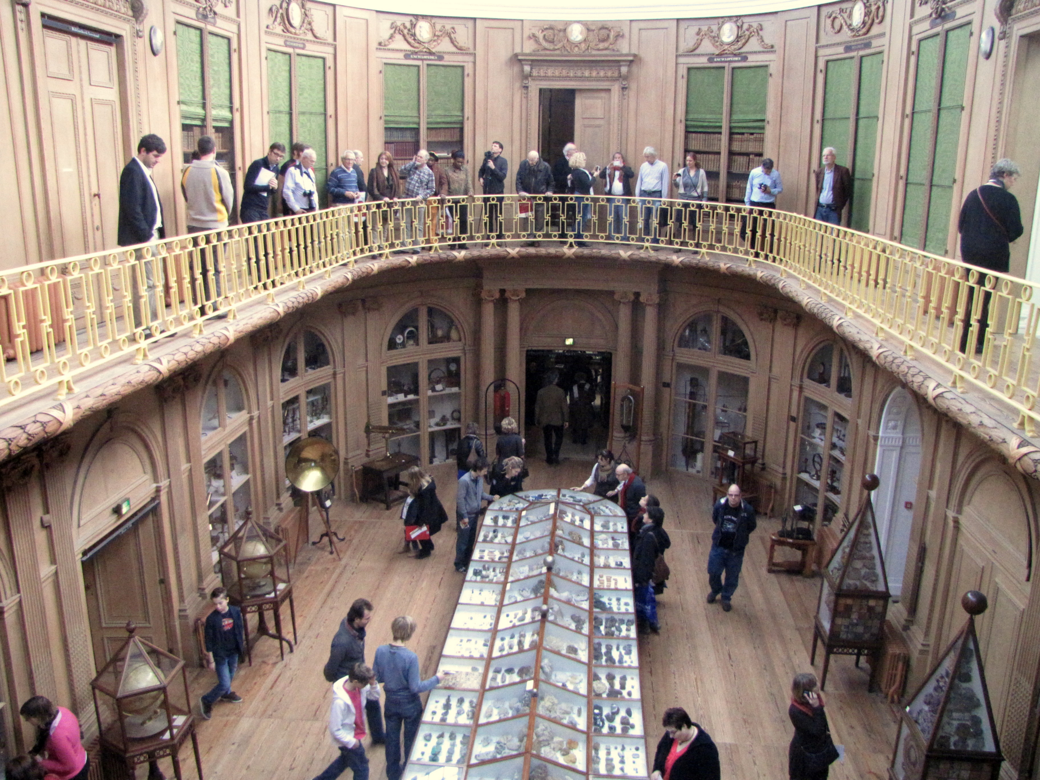 Nieuwjaarsborrel 2012 van Wikimedia Nederland: Teylers Museum, Haarlem.